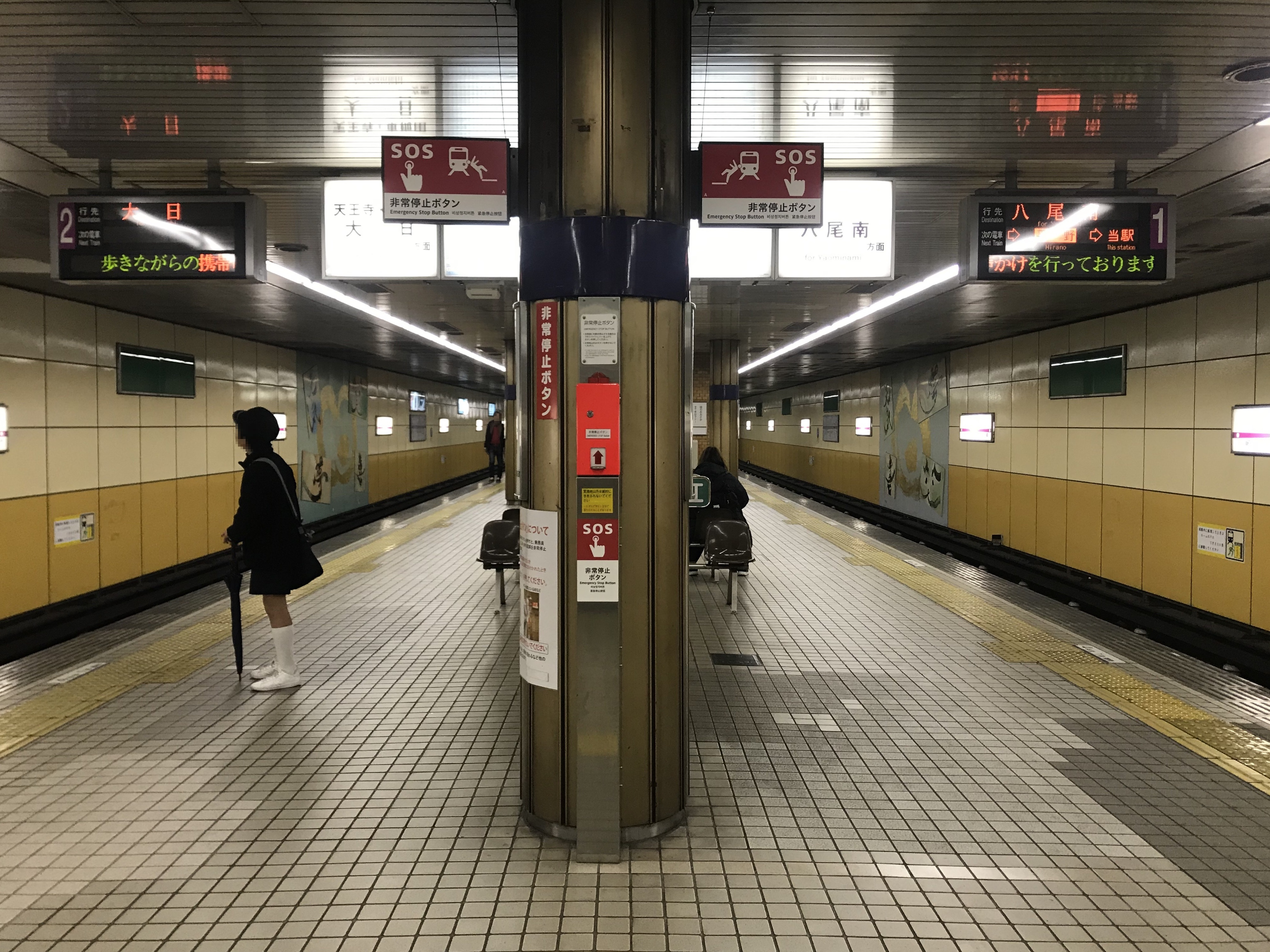 喜連瓜破駅のホーム(奥は平野方面)